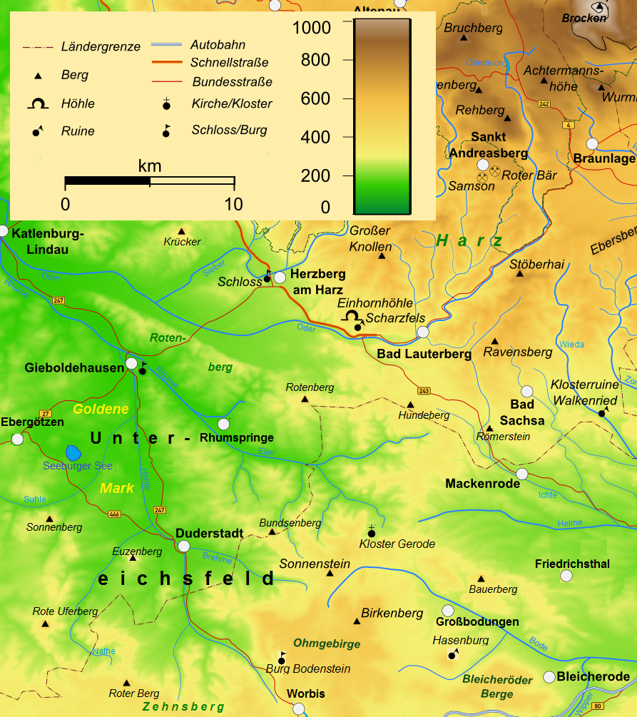 Ausschnitskarte Südwest Untereichsfeld